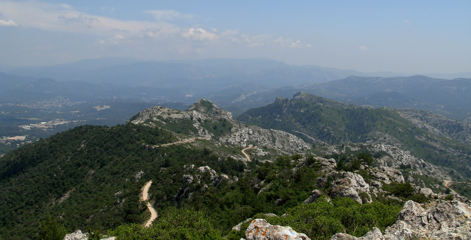 Le Mont Julien, extrémité est du massif de l'Étoile, vu du Grand Puech (photo prise en direction du sud-est)